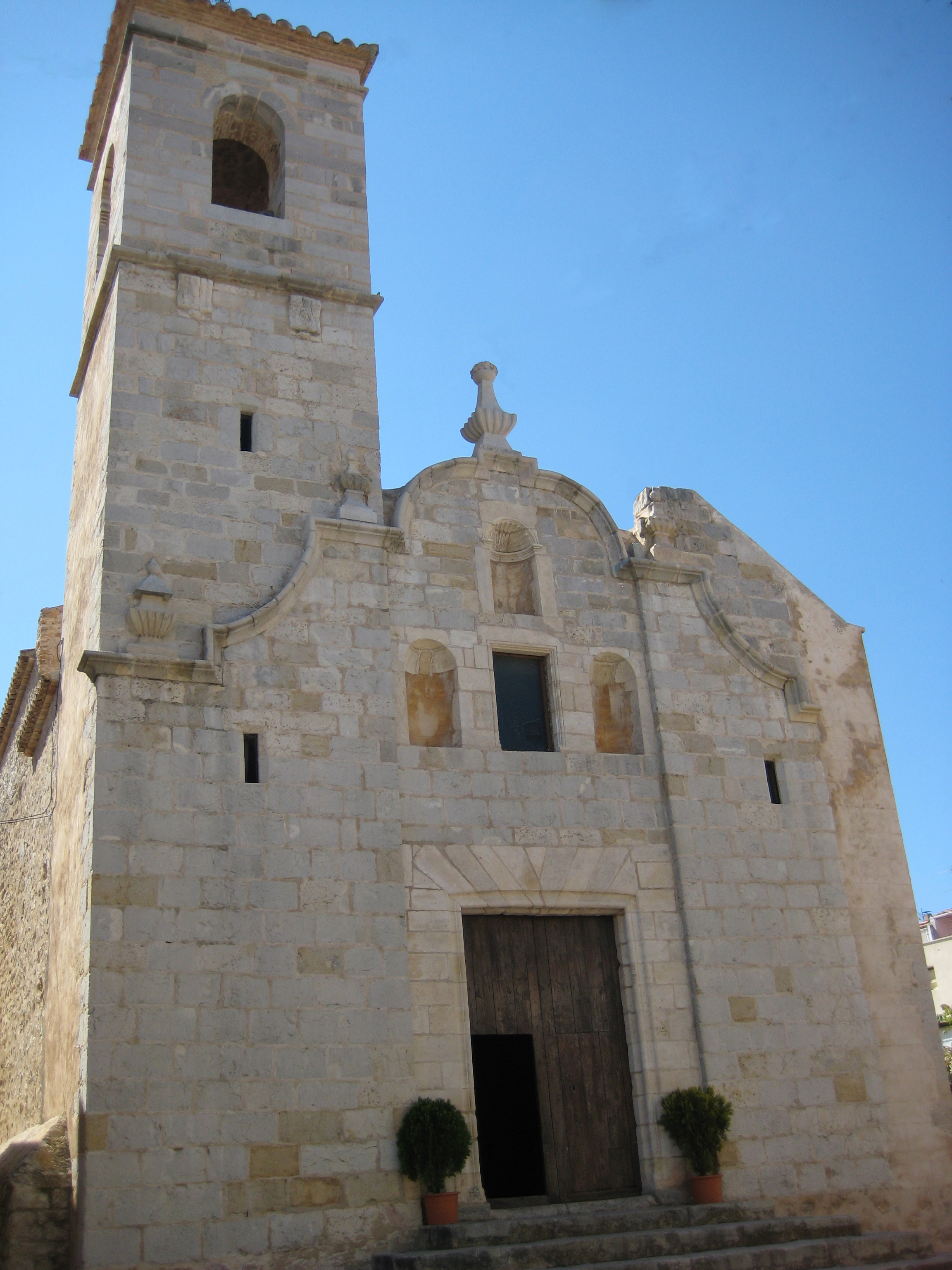 ESglésia de Sant Pere, Sant Mateu (Baix Maestrat)